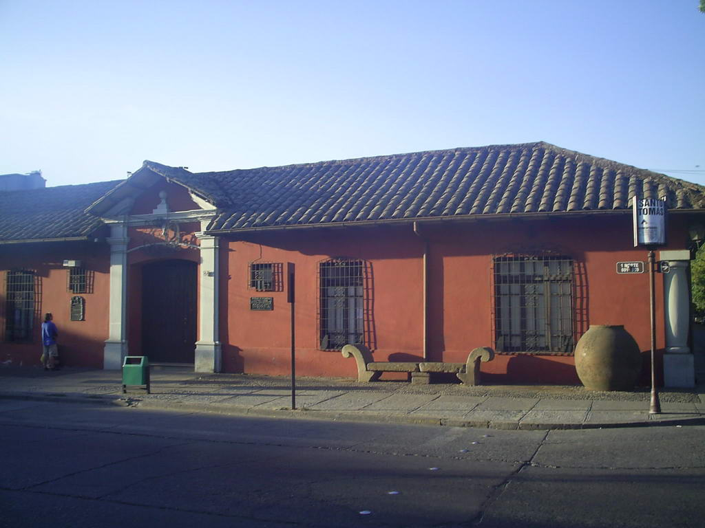 Museo O'Higginiano y de Bellas Artes de TalcaCasa que fue de la Familia Gaete - Arriagada - y de Balboa Lagarde, antes de ser Museo. Ubicado en 1 Norte esquina con 2 Oriente.